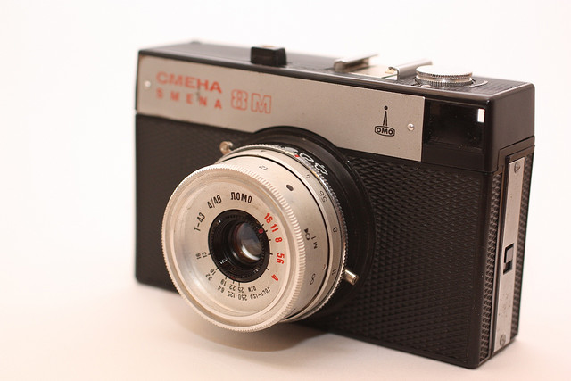 LOMO Smena 8M